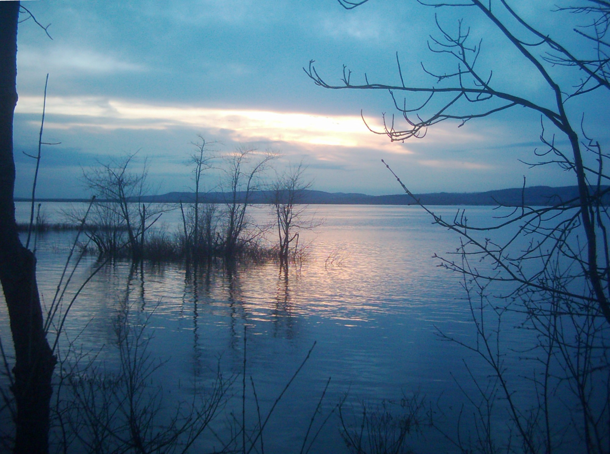 Coucher du soleil bleu sur le lac au printemps. Parc nature du Cap Saint-Jacques A blue sunset over the Deux-Montagnes Lake, Montréal, Québec, Canada